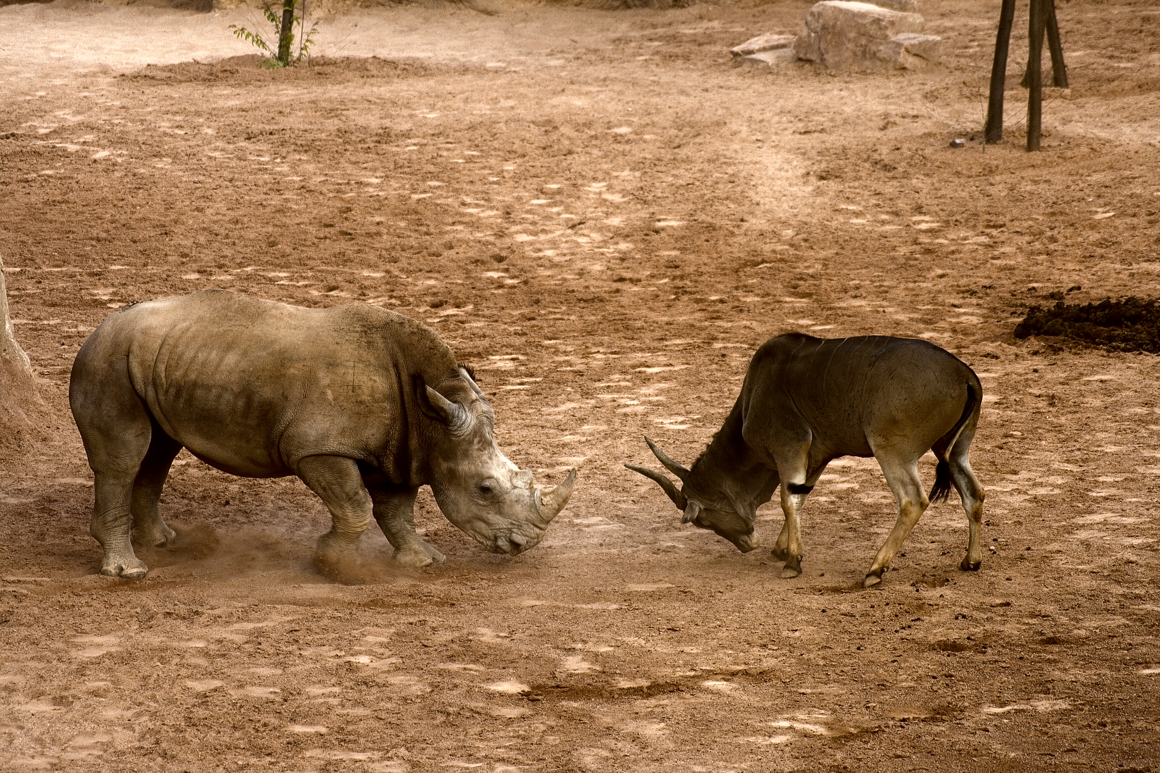 Choque de trenes II - Bioparc Valencia